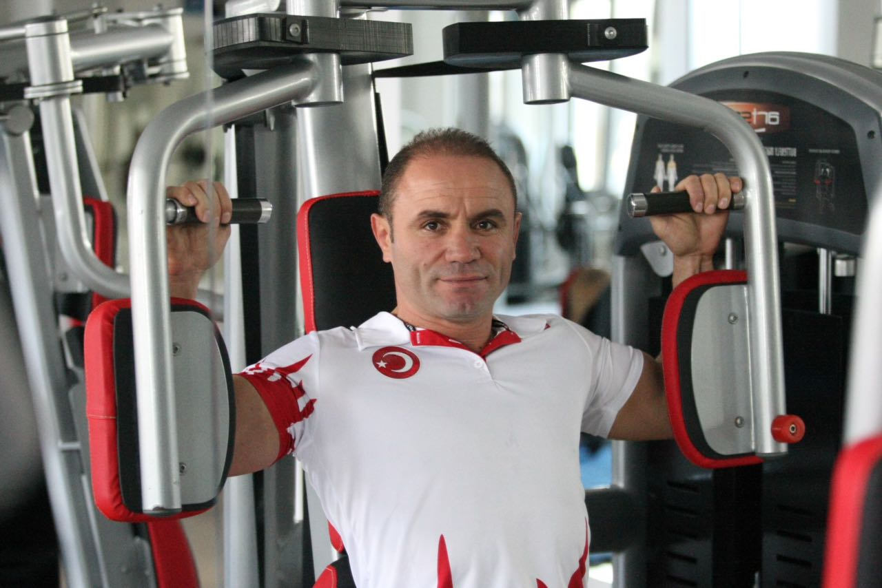 Kadir Gırdoğlu